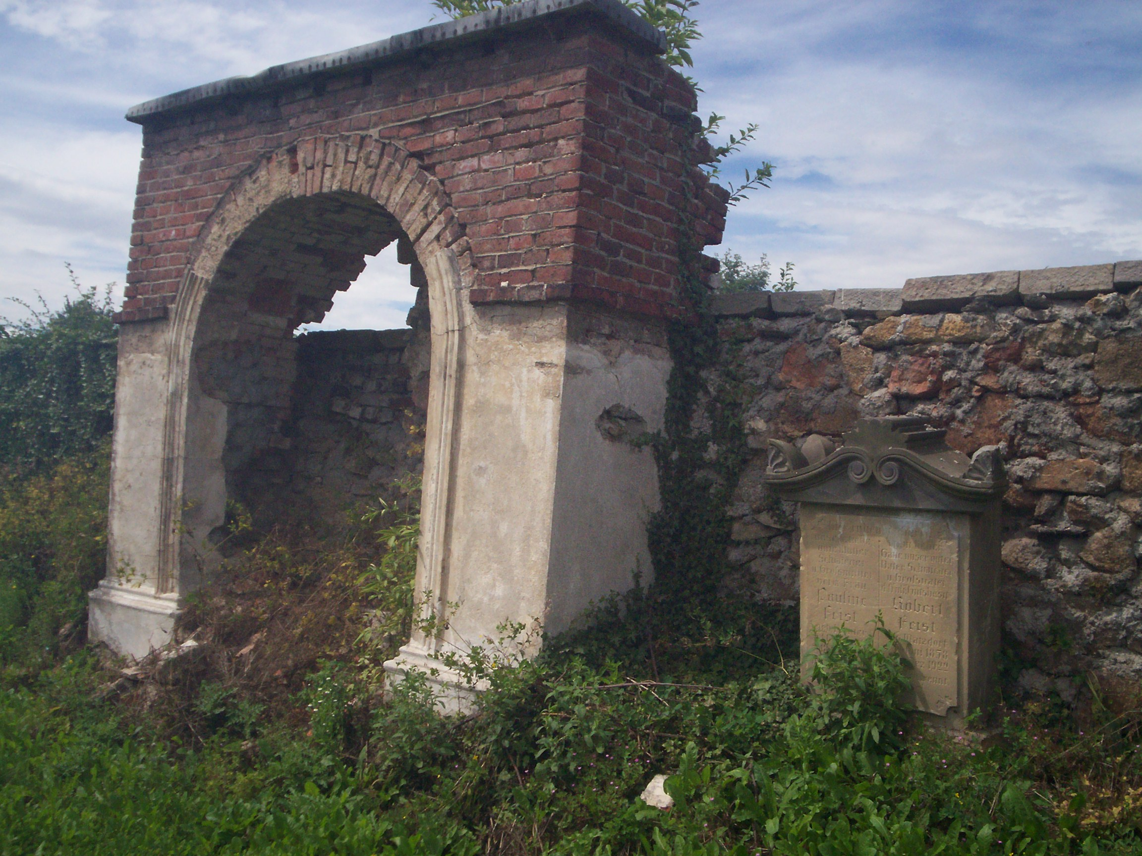 Radomice – kościół pw. św. Jakuba Apostoła i św. Katarzyny, przykościelny cmentarz.